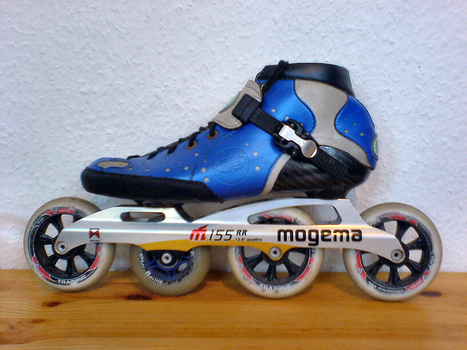 Speedskate der Marke Hyper mit 3 x 100 mm und 1 x 84 mm Rollen.